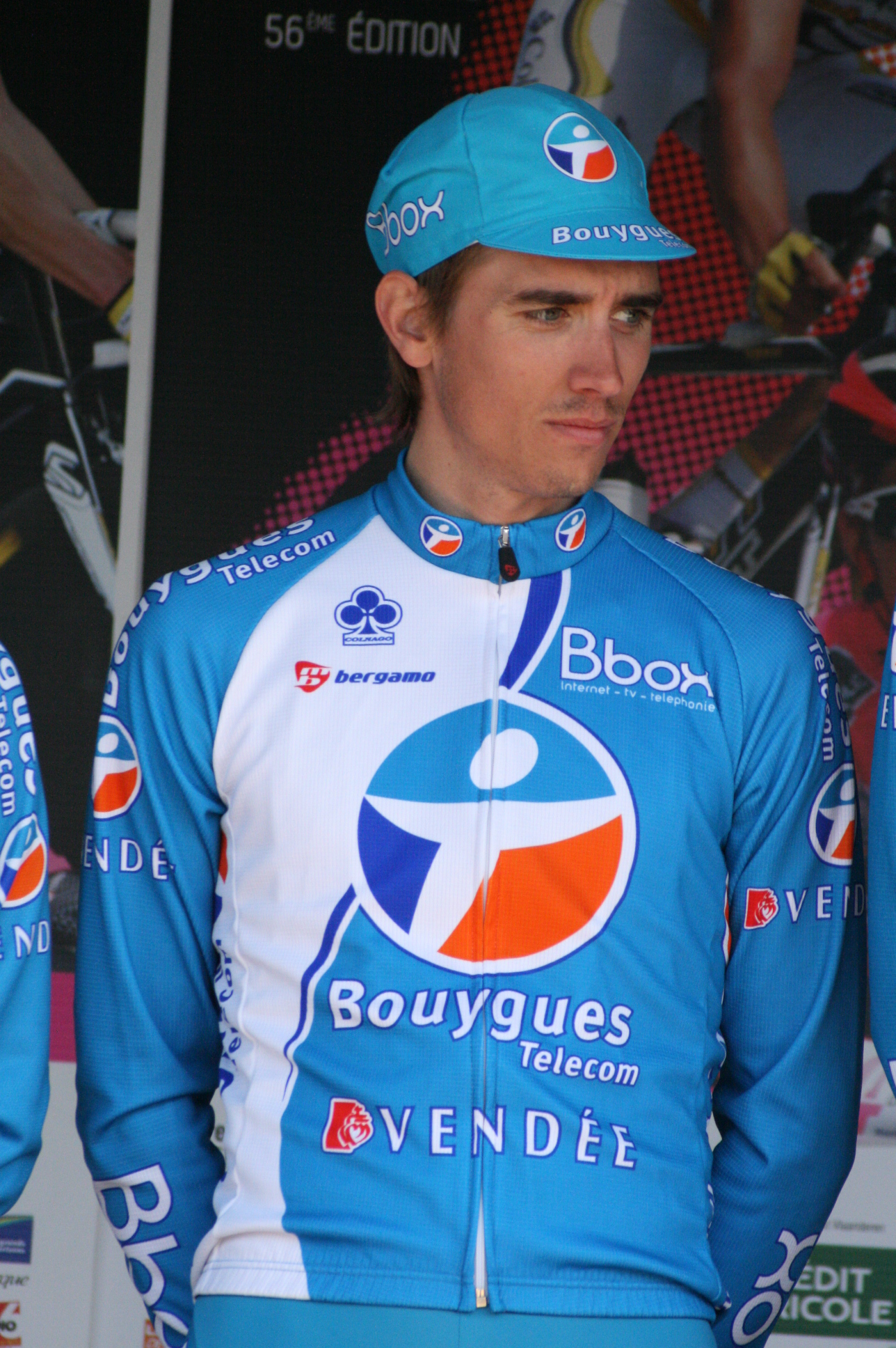 Vincent Jérôme, lors de la présentation des équipes des 4 jours de Dunkerque 2010